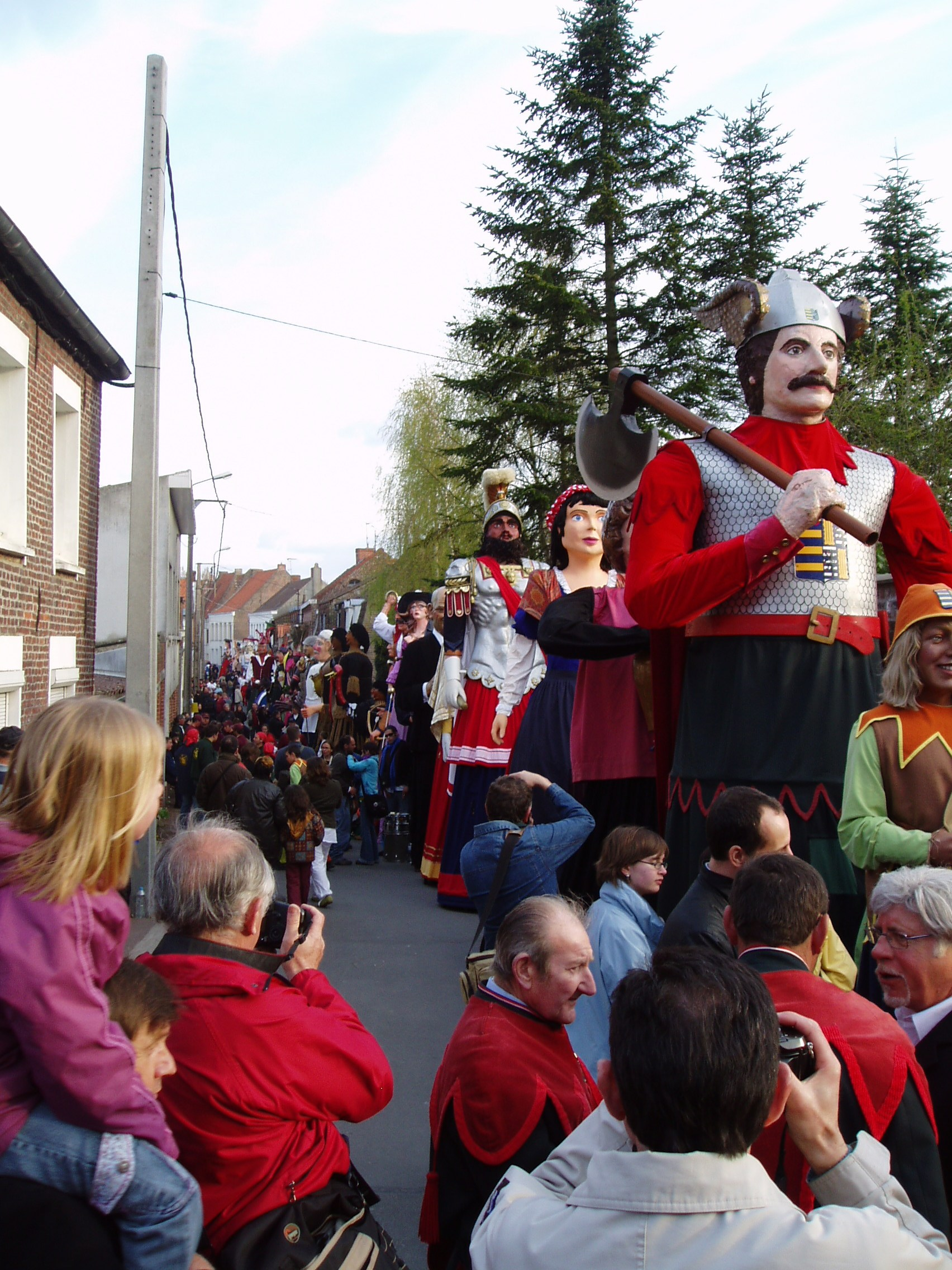 Ronde européenne de géants portés - Steenvoorde 2006